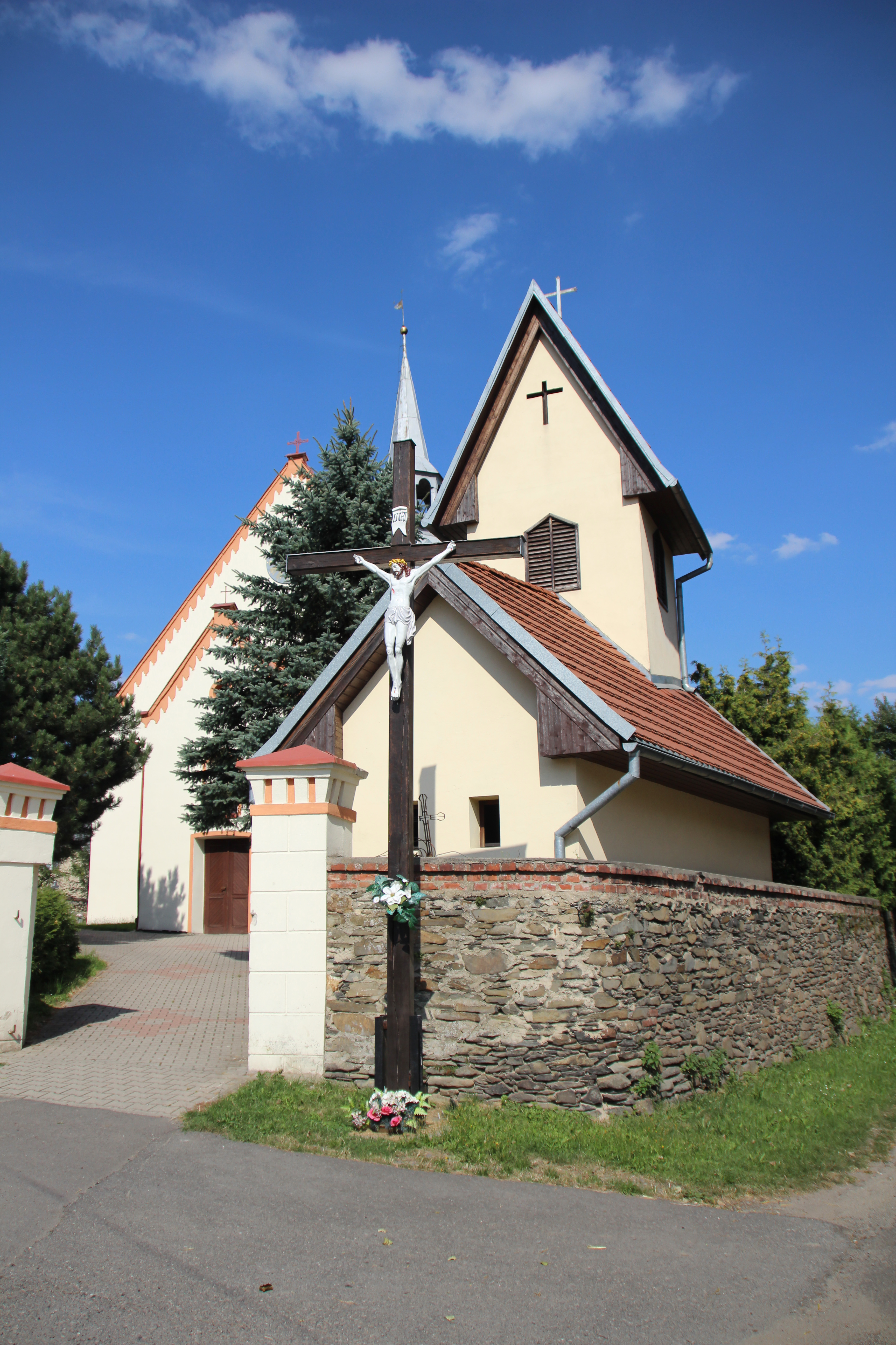 Mieszkowice – wieś w Polsce położona w województwie opolskim, w powiecie prudnickim, w gminie Prudnik.